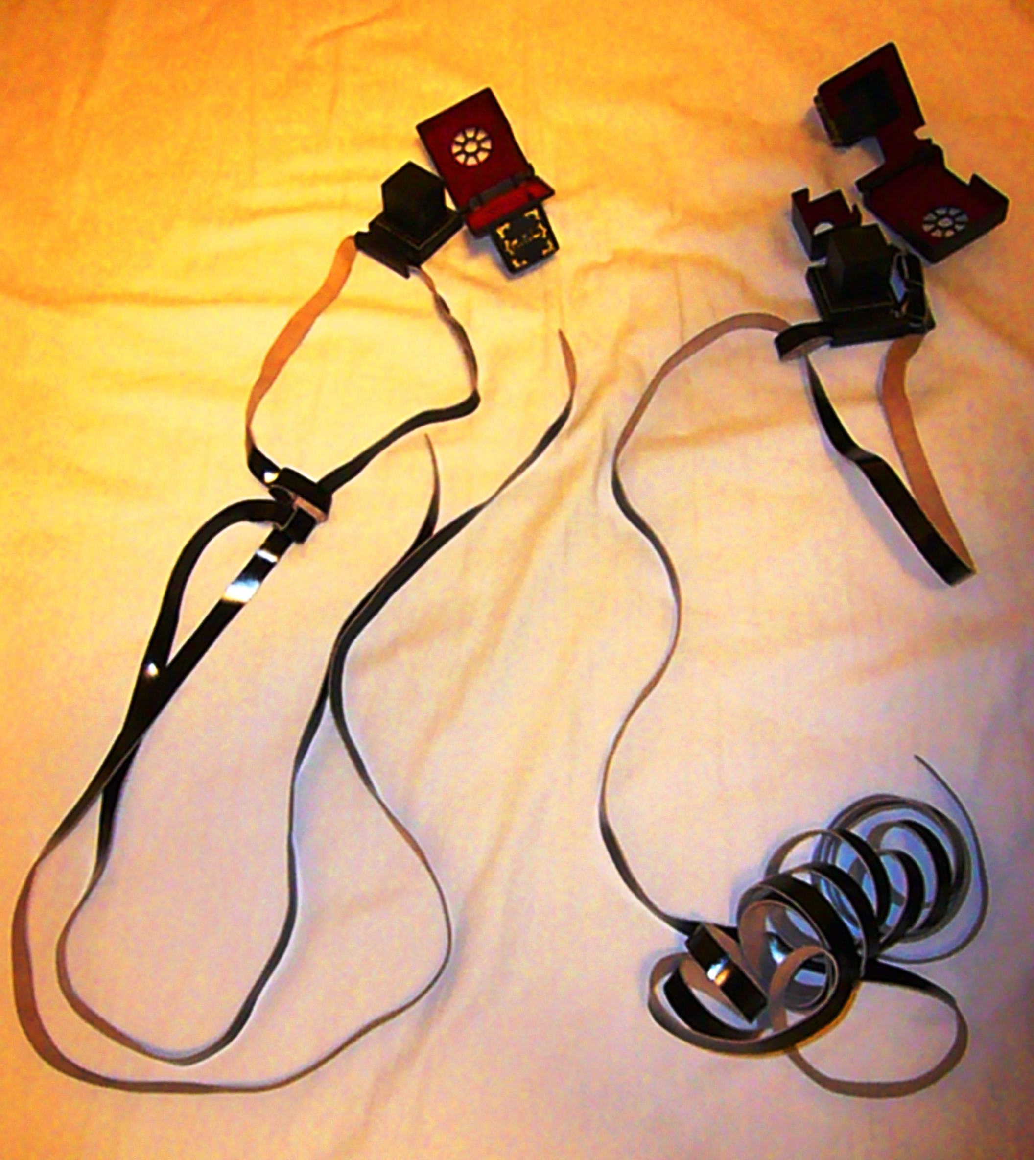 my tefillin.